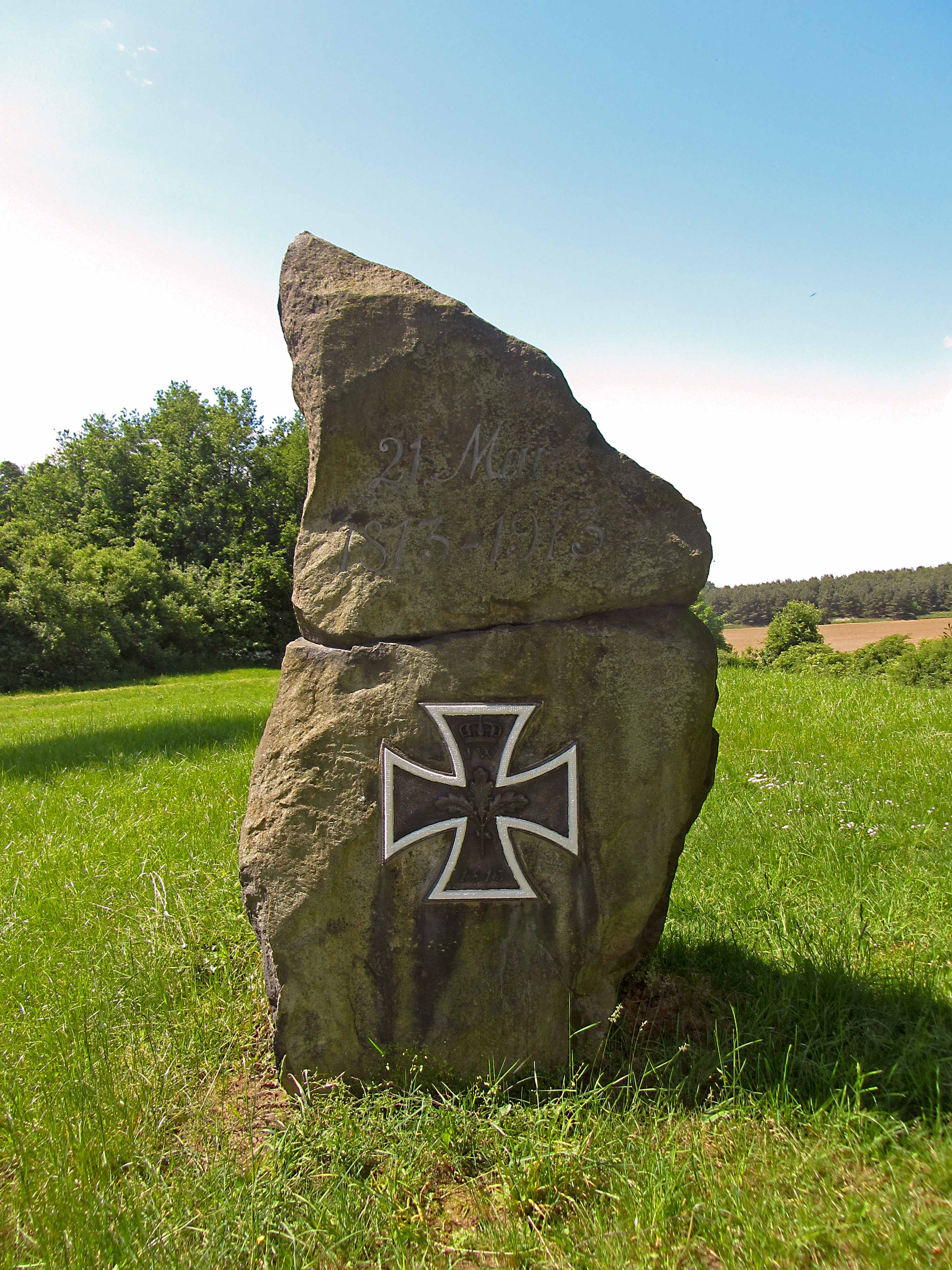 Blücherstein in Kreckwitz, Inschrift: 21. Mai 1813-1913